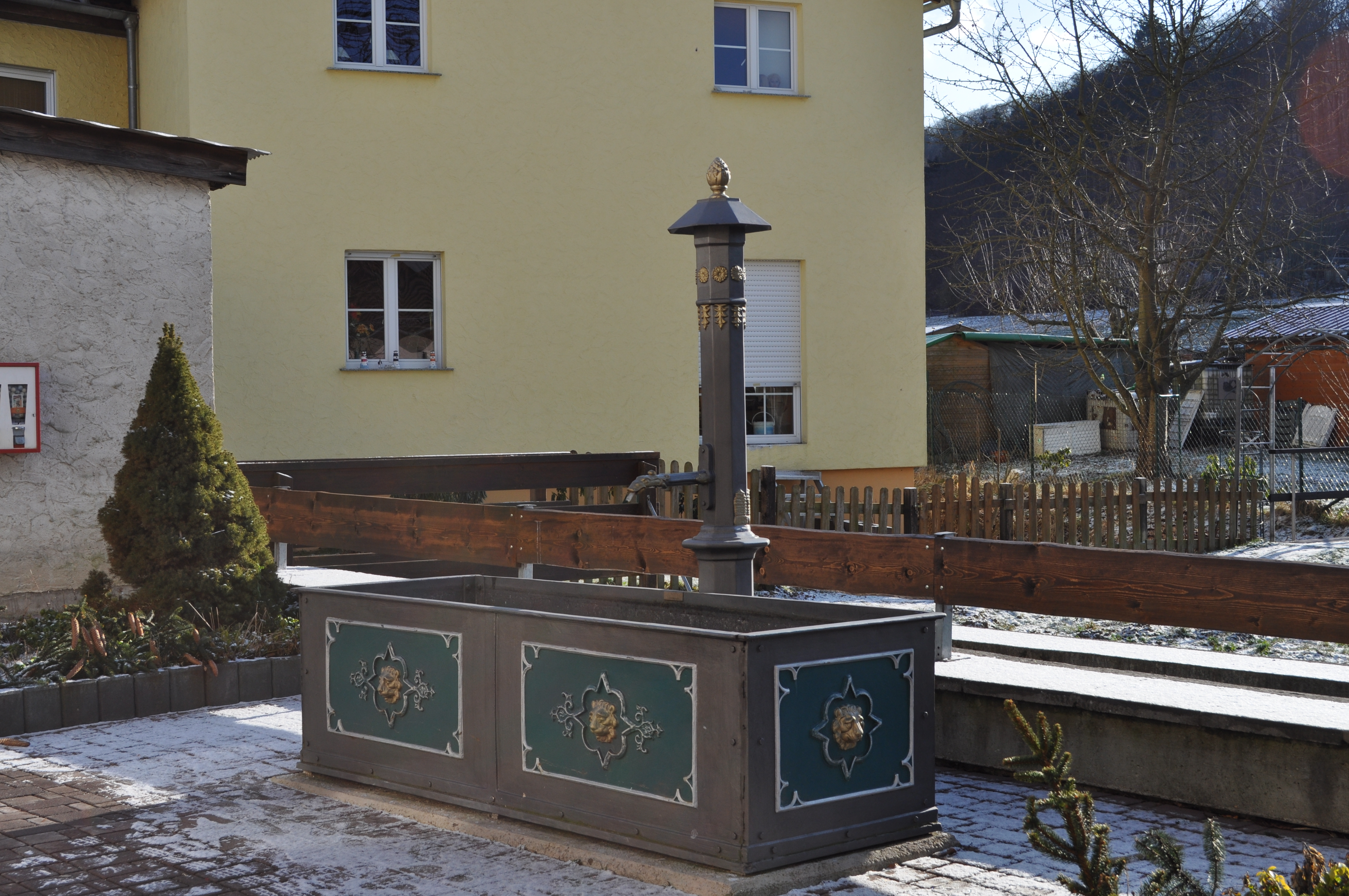 Brunnen in der Langgasse von Wüstems